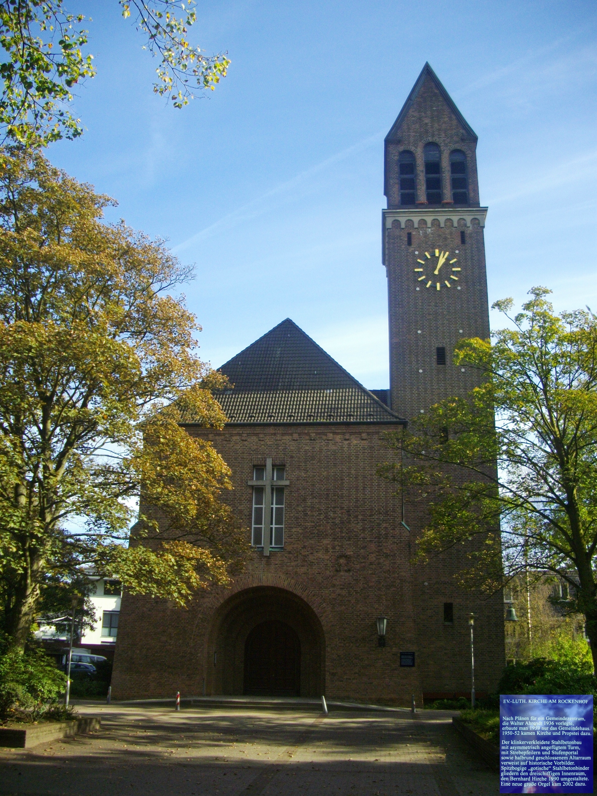 Ev.Luth.Kirche am Rockenhof